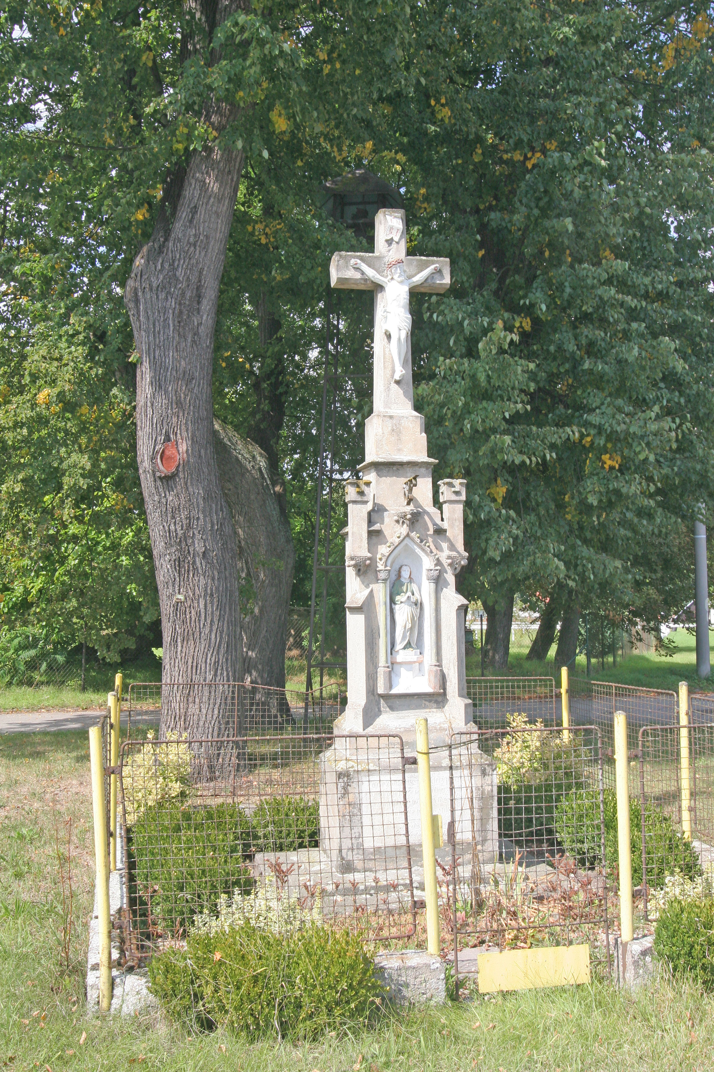 Kolesa kříž